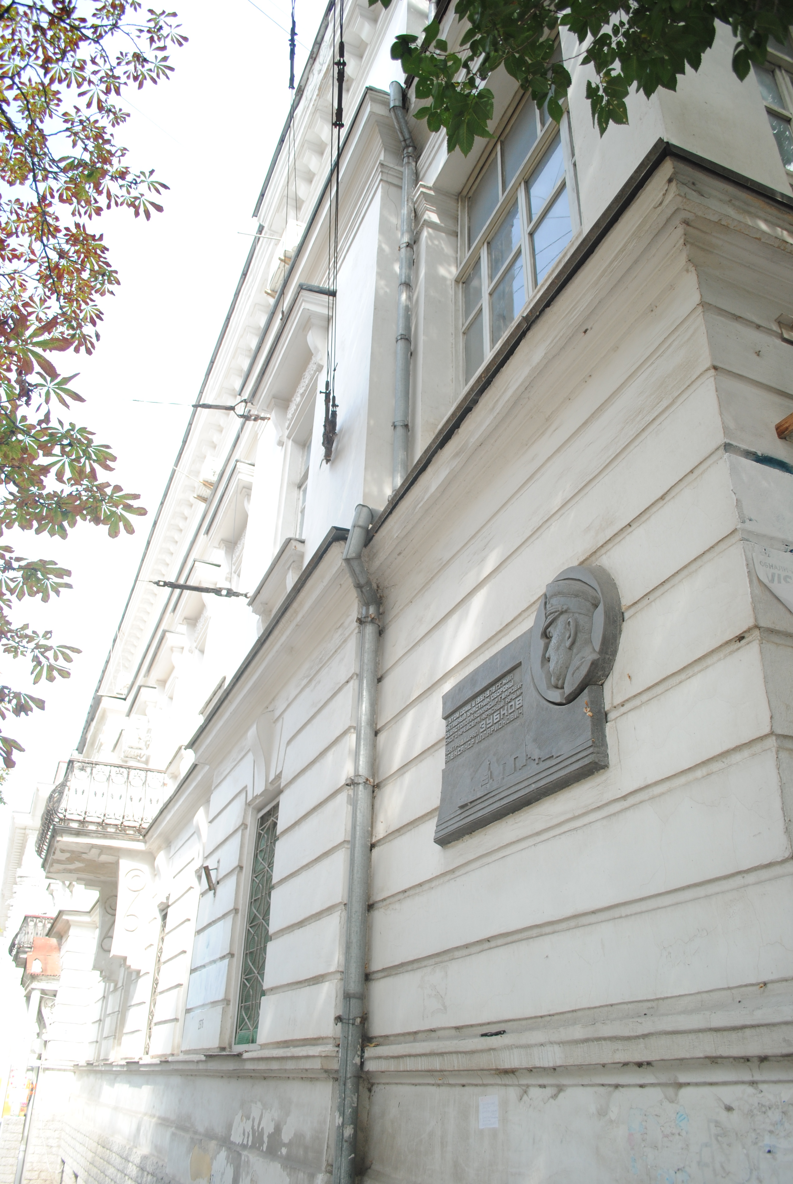 Жилой дом причта Михайловской церкви, в котором жил участник обороны Севастополя, контр-адмирал Зубков А.И.: улица Ленина, 5, Ленинский район, Севастополь This object is located on the Crimean Peninsula and recognized as cultural heritage by both Russia and Ukraine under the monument ID: 9230143000/ 85-366-0194, respectively. The legal status of the Crimean region is currently disputed.